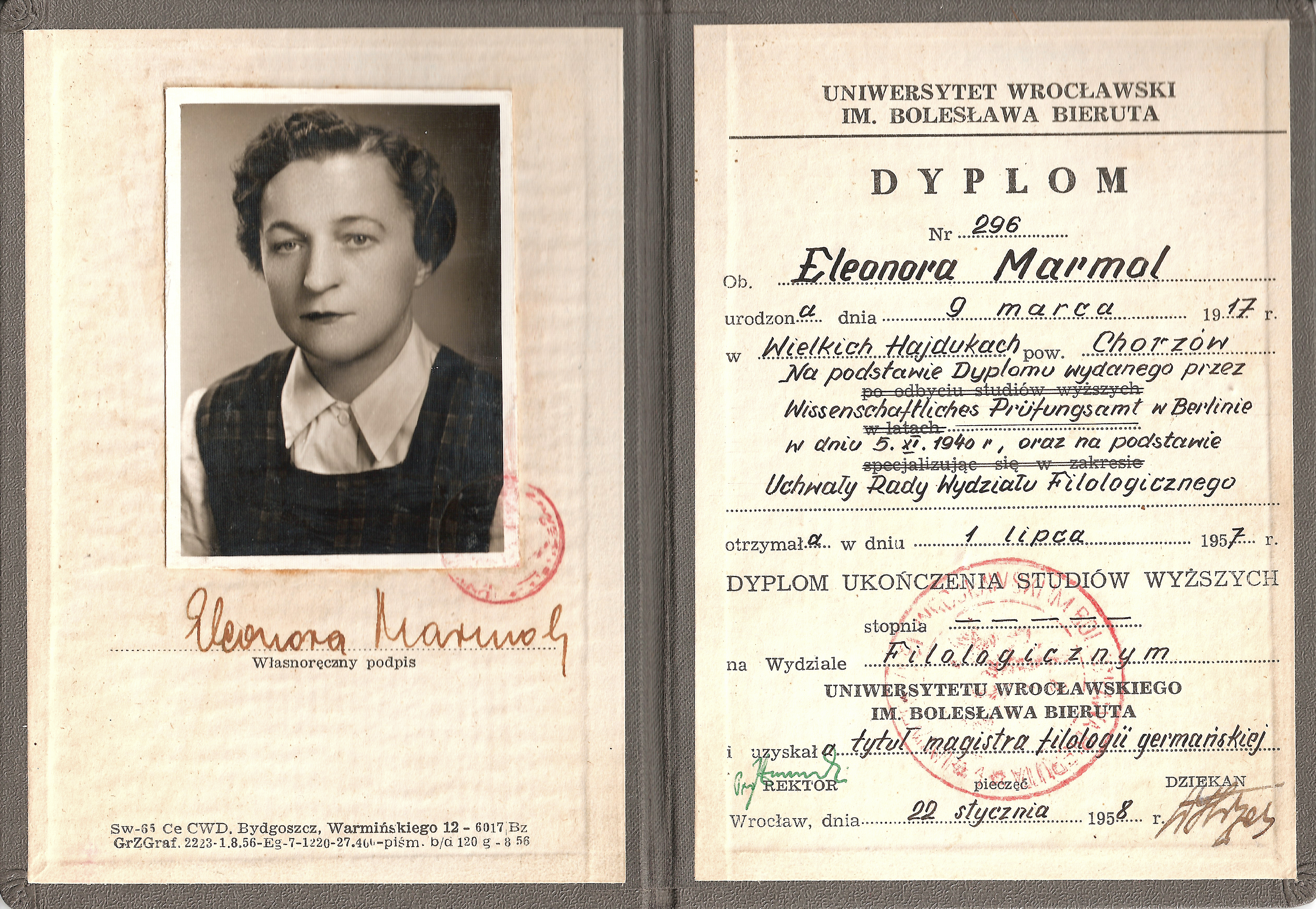 Dyplom magisterski Uniwersytetu Wrocławskiego z lat 50. (wówczas Uniwersytetu im Bolesława Bieruta we Wrocławiu)